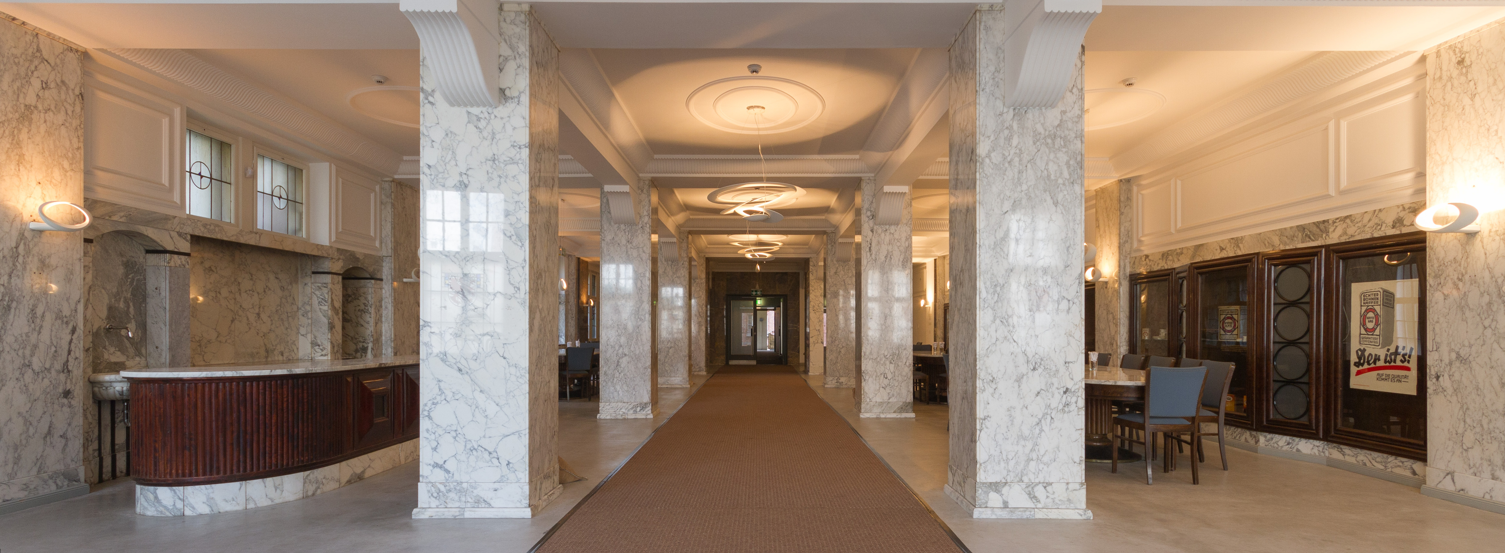 Kaffee Hag in Bremen, Hagstraße 3Das abgebildete Objekt ist ein geschütztes Kulturdenkmal in der Freien Hansestadt Bremen, mit der Nr. 0470 beim Landesamt für Denkmalpflege registriert.